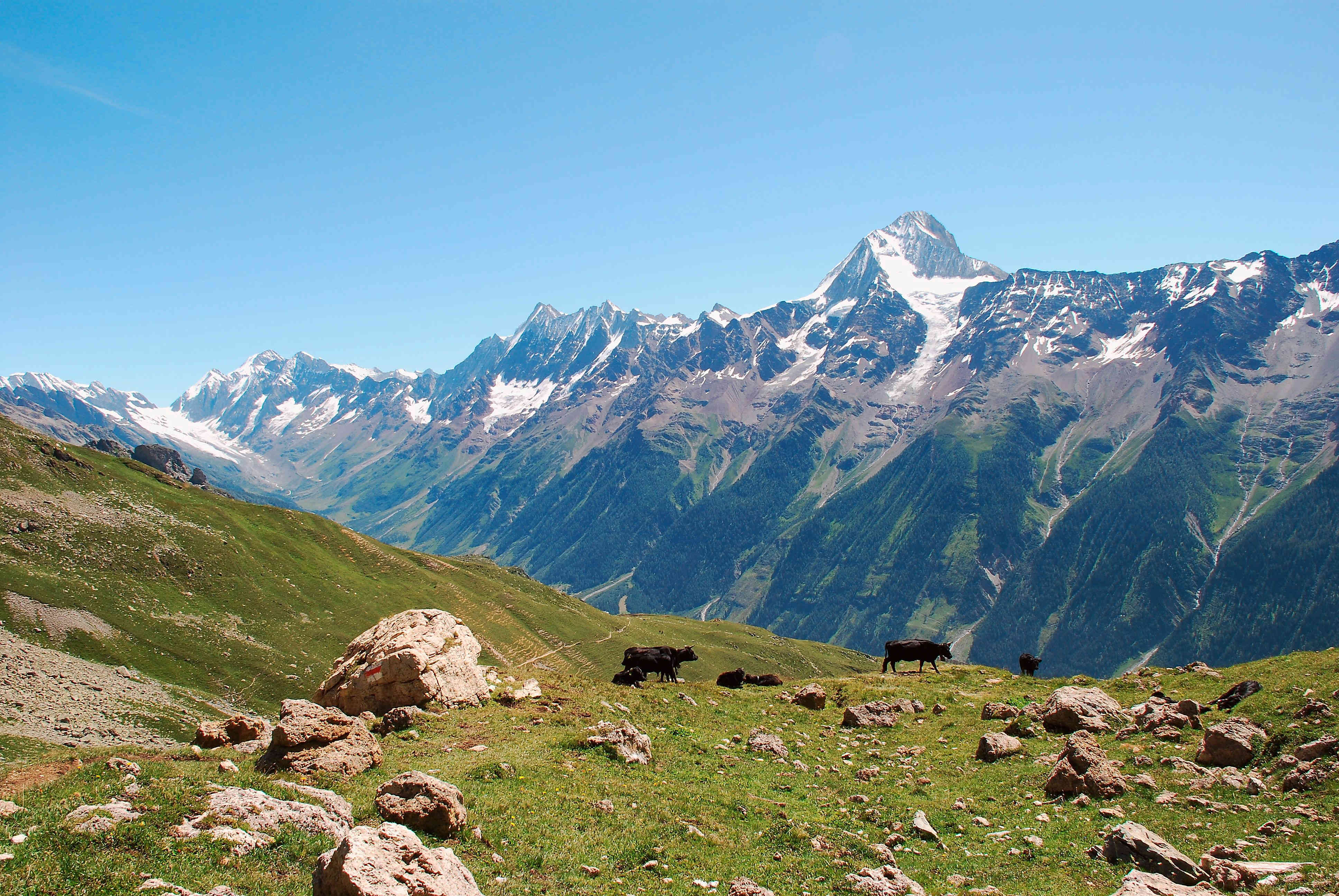 en.: Bietschhorn at Lötschental, Switzerland; dt.: Bietschhorn im Lötschental, Schweiz